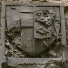 Torre dei Visdomini, stemma Viddomini